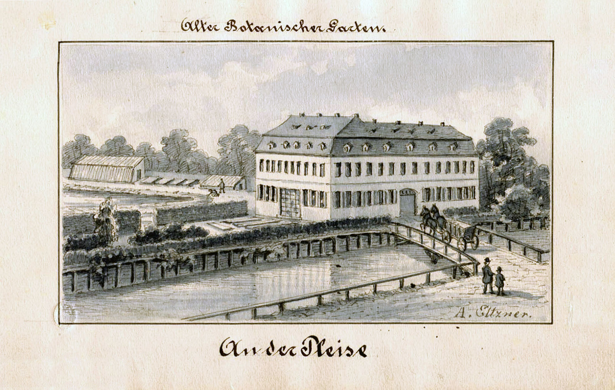 An der Pleise. Alter Botanischer Garten.Gebäude des Trierschen Instituts im ehemaligen Botanischen Garten Leipzig auf dem Gelände des heutigen Reichsgerichtsgebäudes, lavierte Federzeichnung von Adolf Eltzner, um 1860